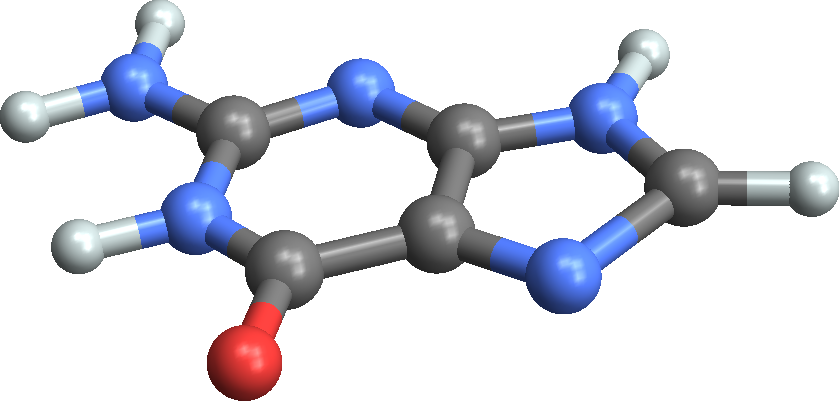 Трехмерная модель молекулы гуанина